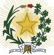 Brasão de Grajaú, Maranhão.